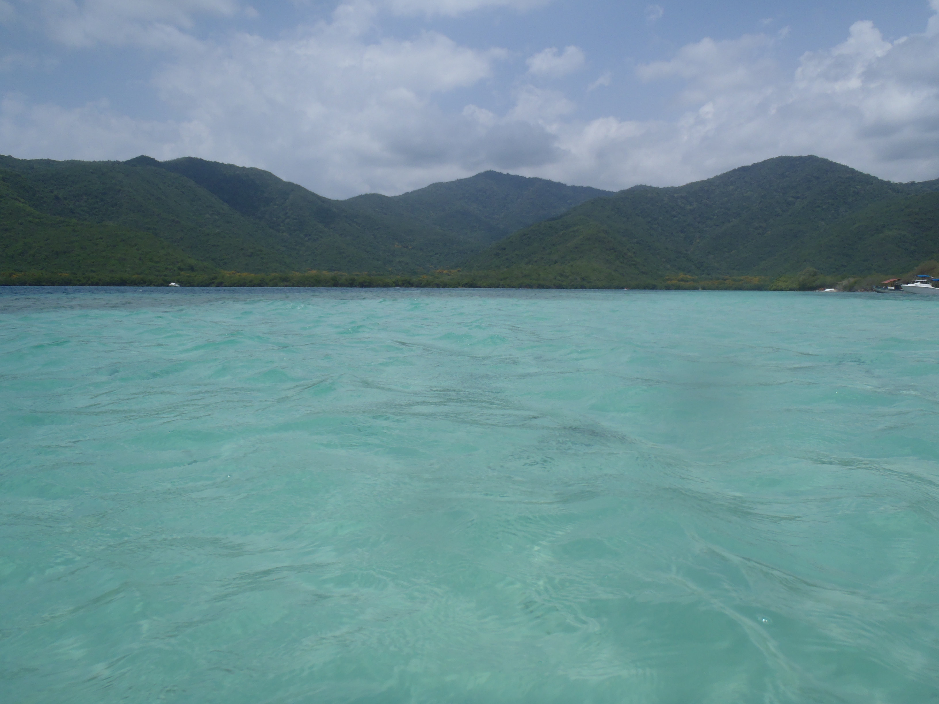 La Ciénaga ubicada en ocumare de la costa estado Aragua, Venezuela